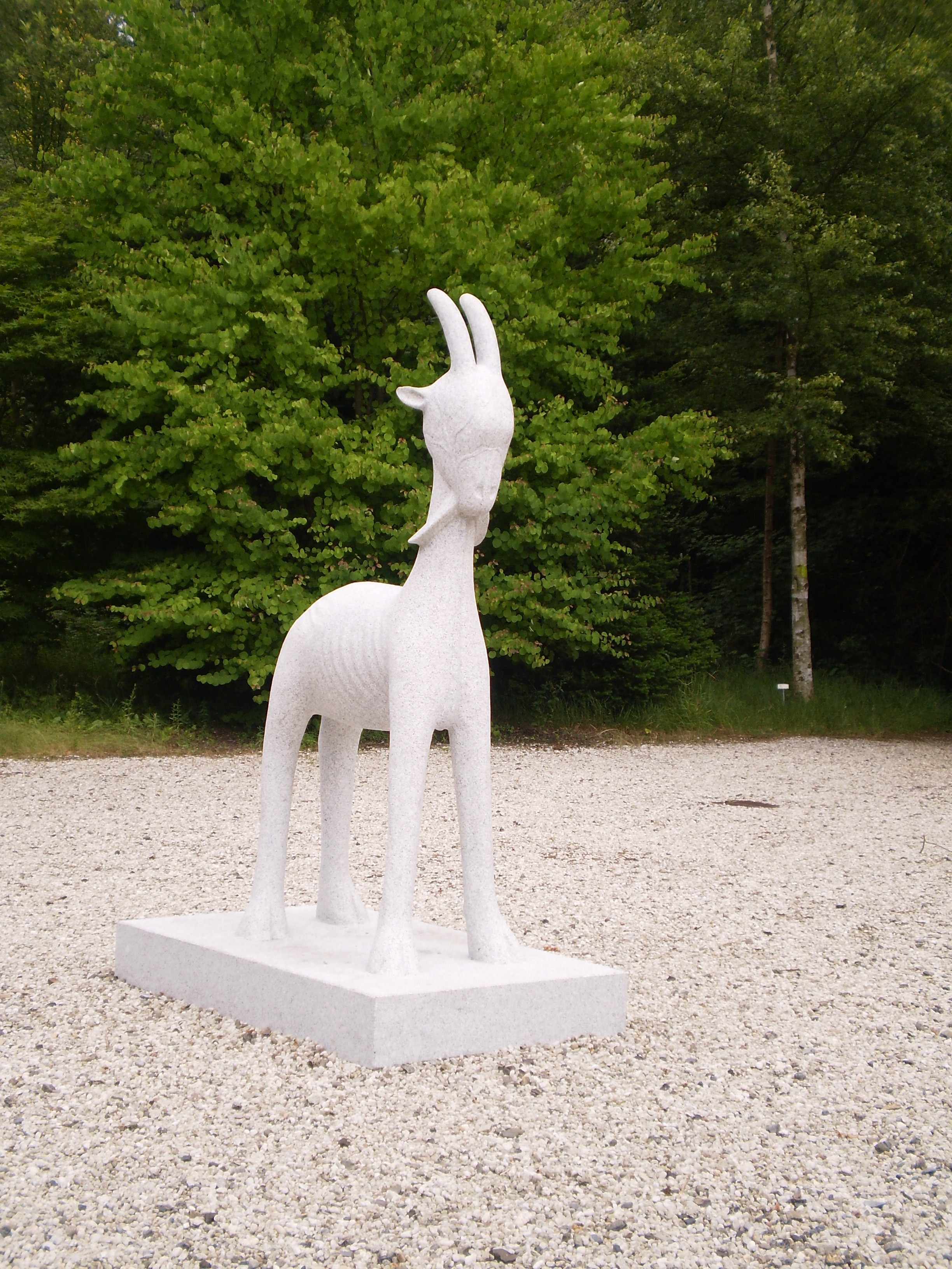 Byld fan in Geit op it terrein fan Larenstein.